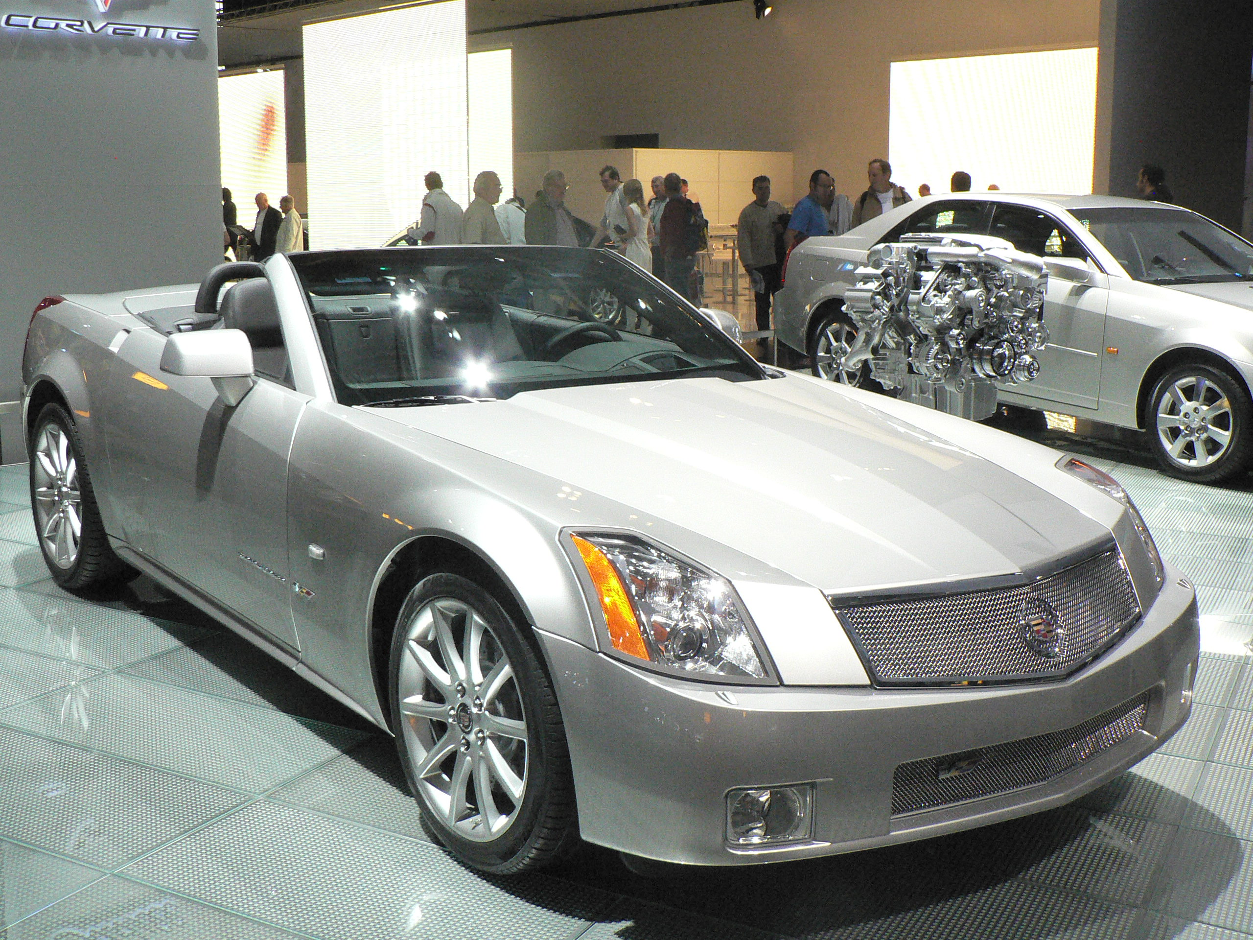 Mondial de l automobile de Paris (October 2006)